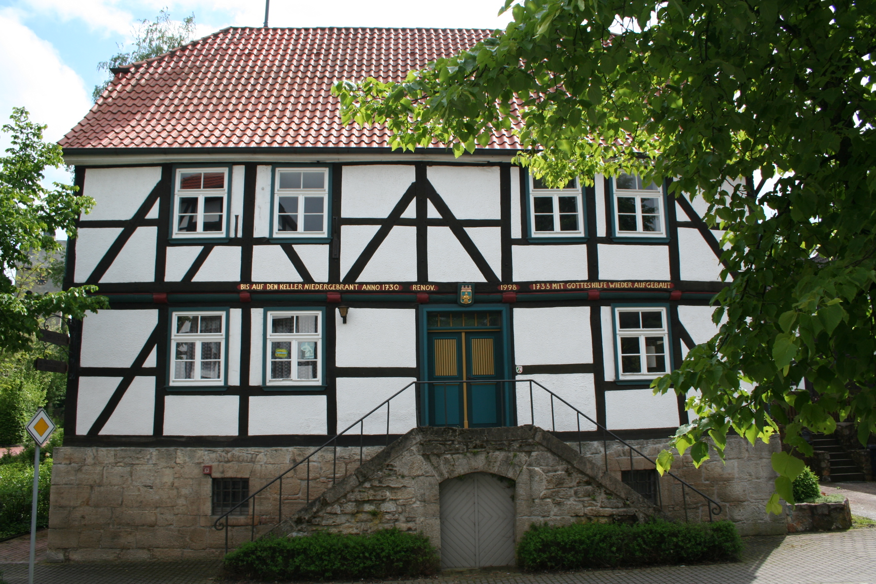 Brakel: ehemaliges Gehrdener Rathaus von 1733